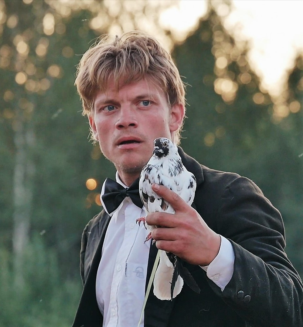 Евгений Ткачук во время открытой репетиции спектакля "Священный полет цветов" по А.Введенскому, театр "ВелесО", июль 2018